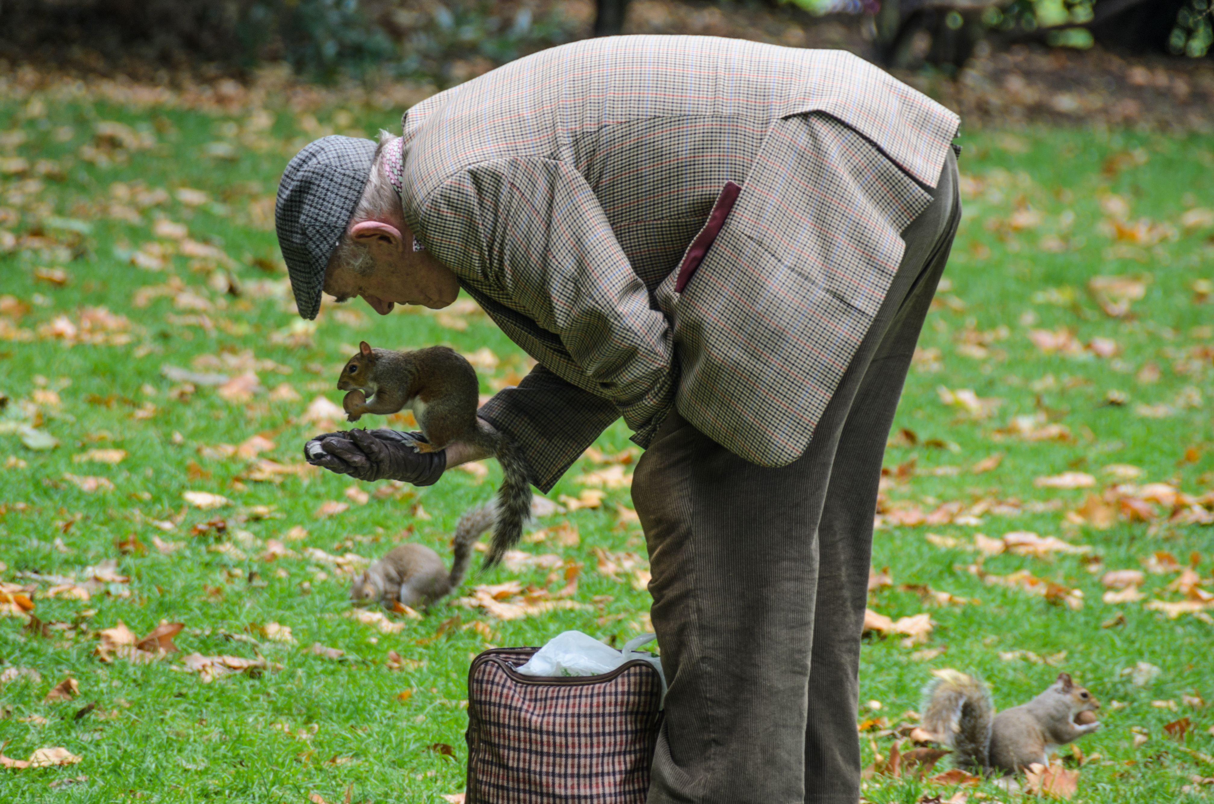 Sciurus sp. being fed in Westminster, London, England.